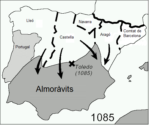 Mapa de la reconquesta dels almoràvits. Traducció des de File:Almoravid map reconquest loc.jpg. La X significa una batalla.